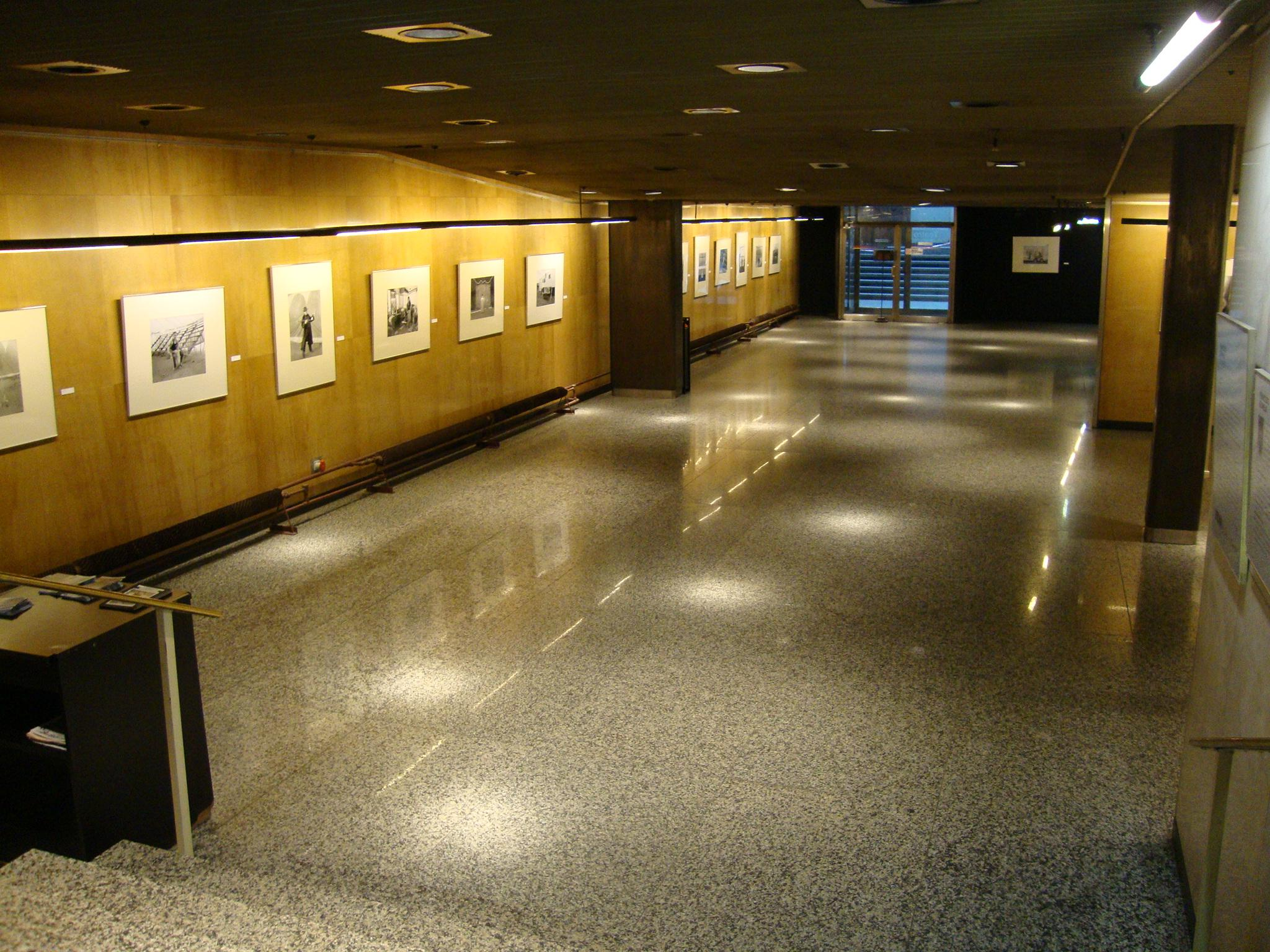 Fotogalería subterránea que conecta el fondo del Teatro General San Martín con el Patio de las Esculturas del Centro Cultural General San Martín. Buenos Aires, Argentina.